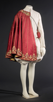 Herreruelo